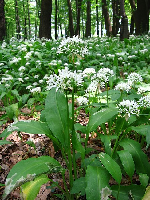 Czosnek niedźwiedzi (Allium ursinum L.)